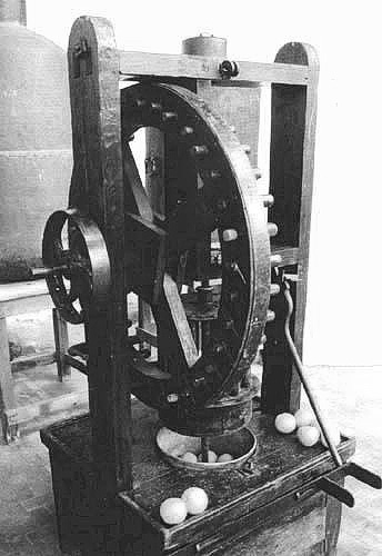 Reggio Calabria - "Macchina Calabrese" per la spremitura dei bergamotti